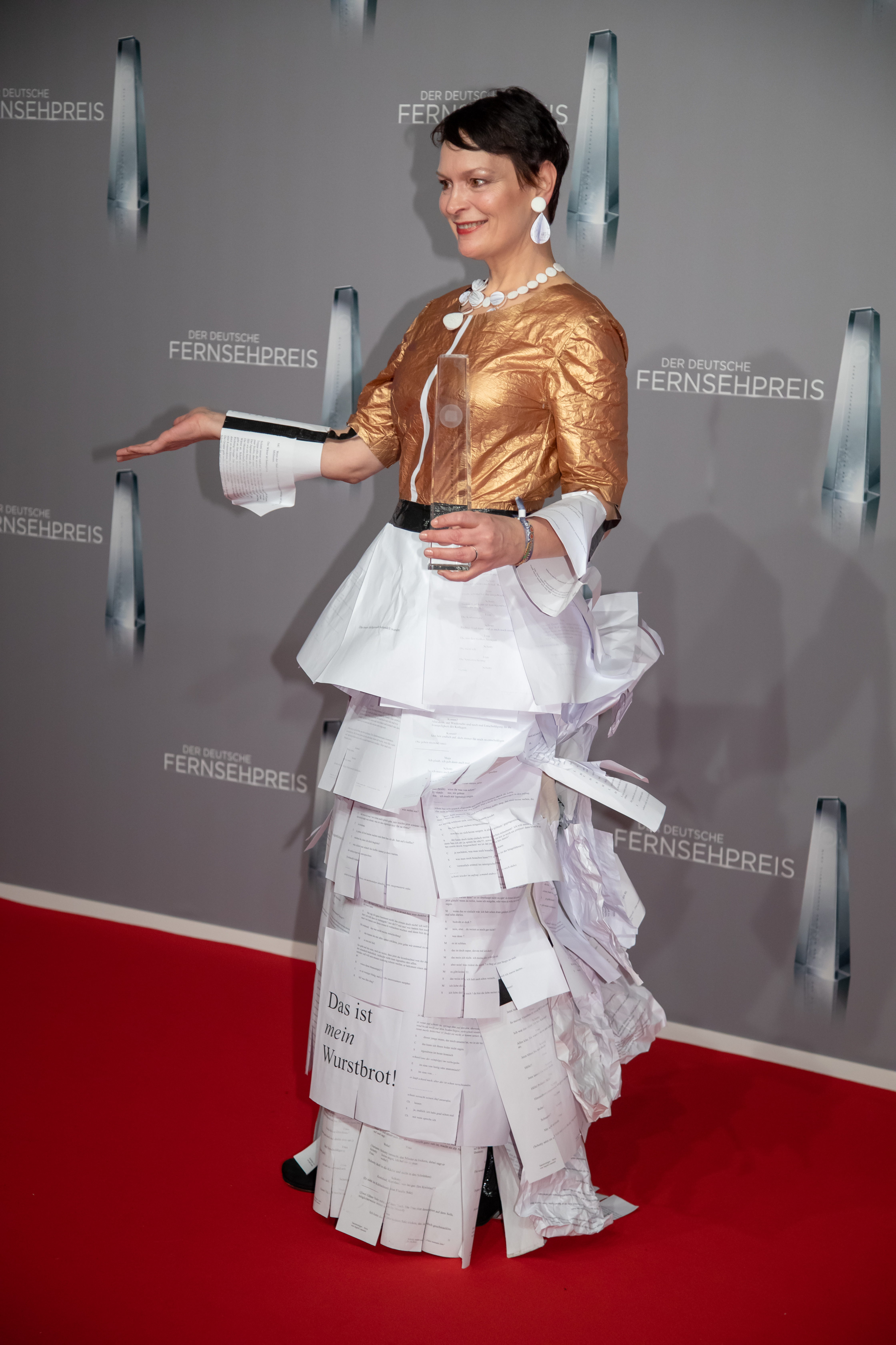 Ingrid Lausund beim Deutschen Fernsehpreis 2019 in der Düsseldorfer Rheinterrasse